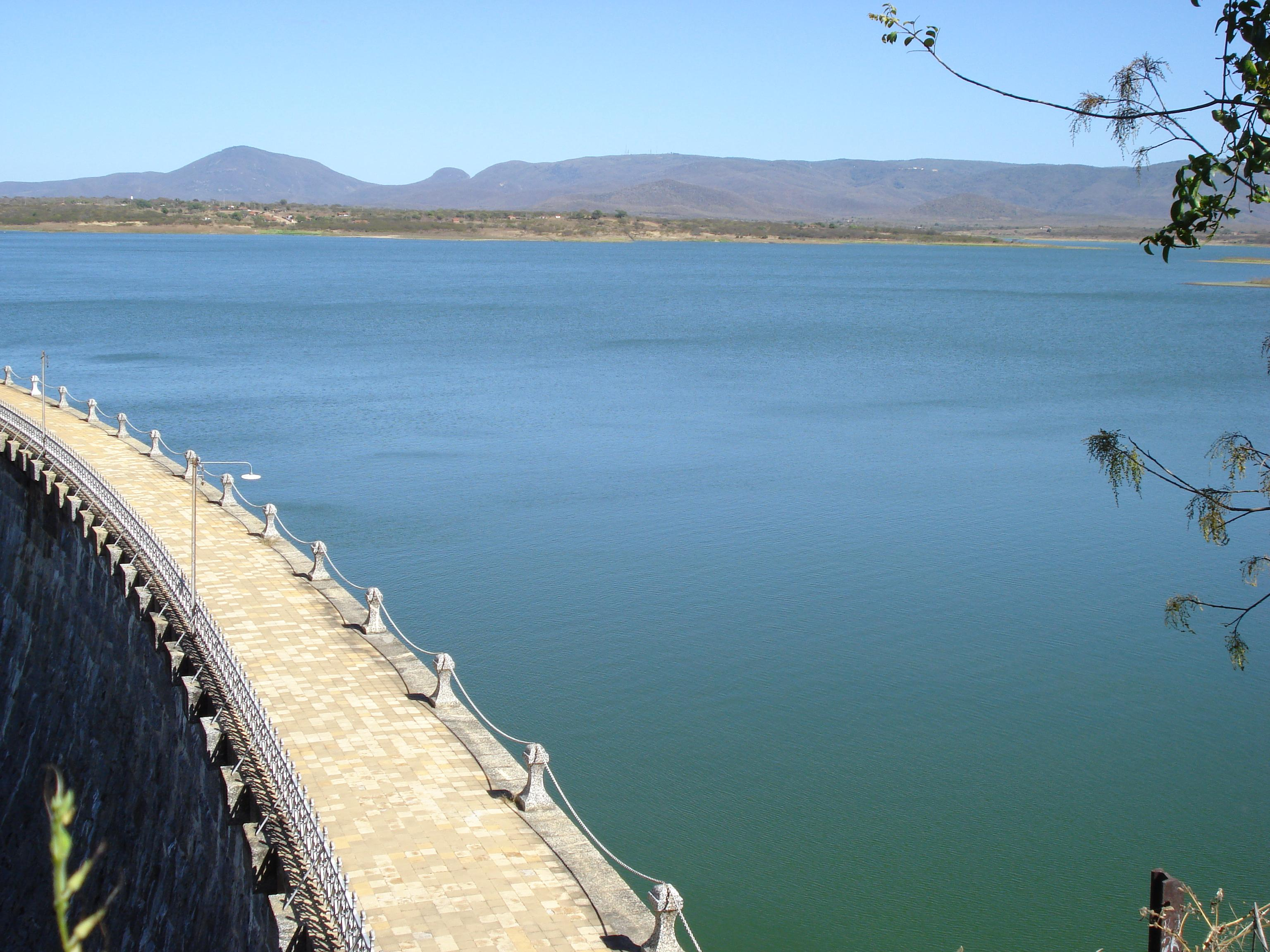 Vista parcial do açude do cedro, Quixadá, Ceará, Brasil.